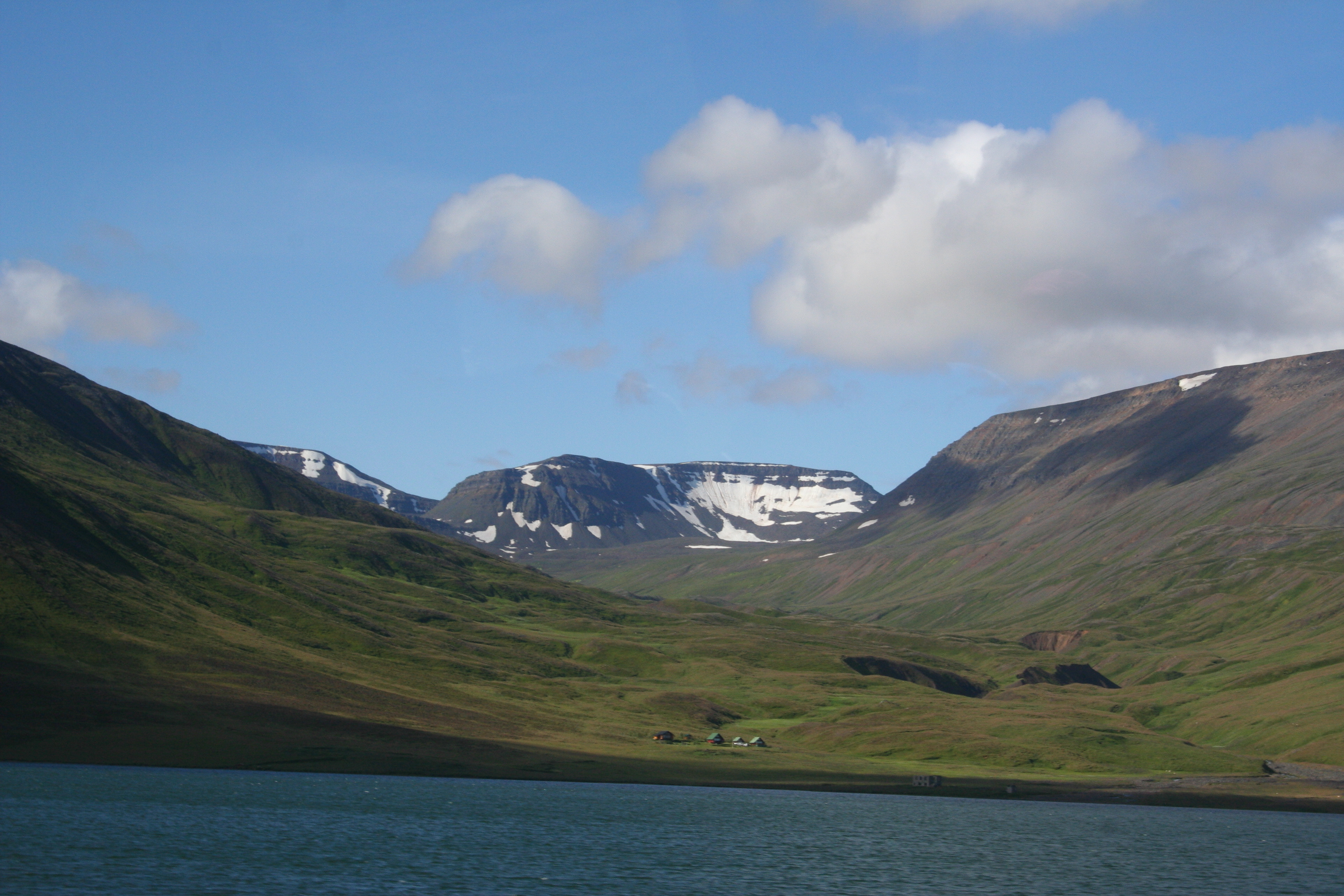 Lagheidi0180